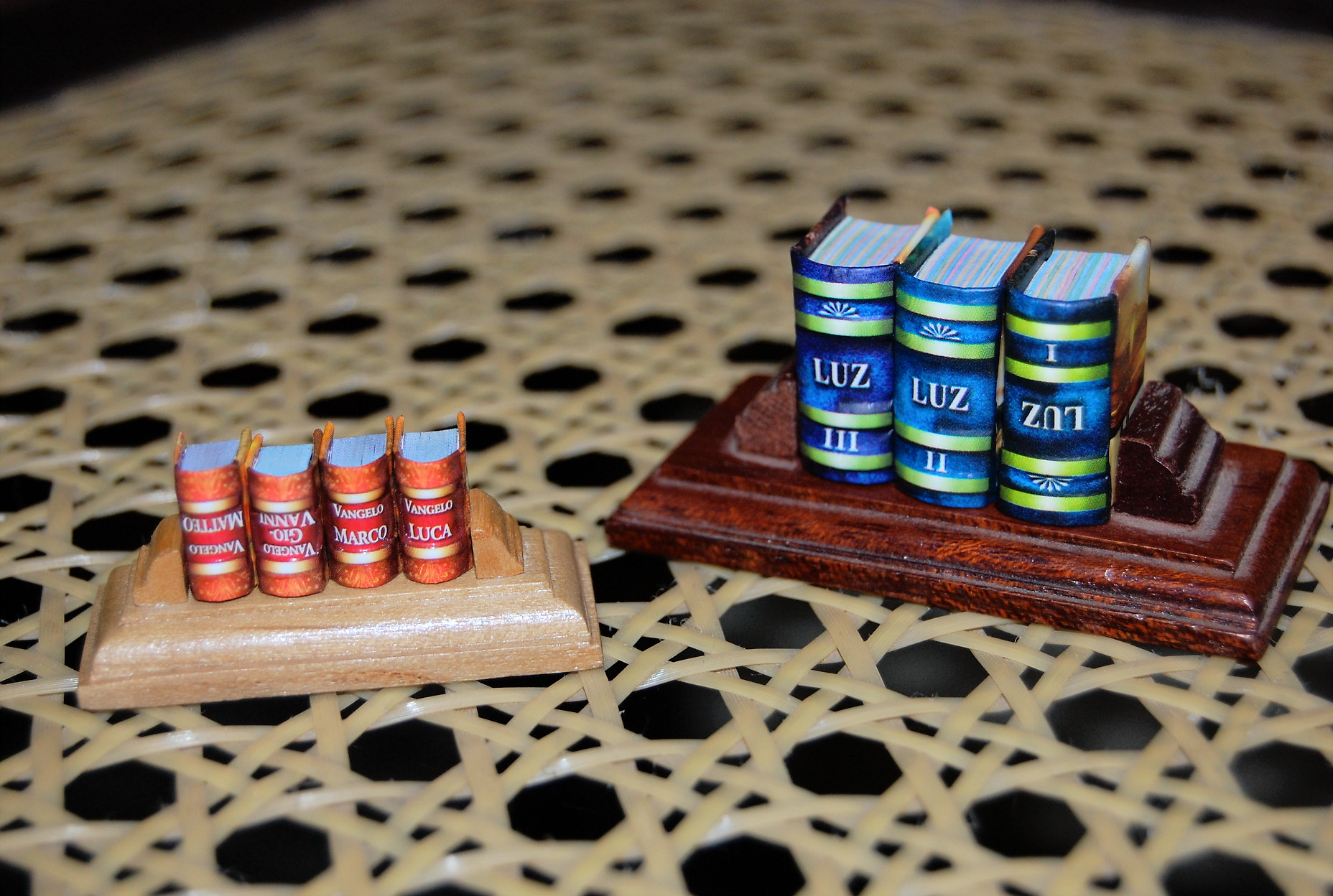 Minilivros dos evangelhos de Lucas, João, Mateus e Marcos e, italiano e outros de auto ajuda da editora peruana los mas pequeños librosdel mundo.